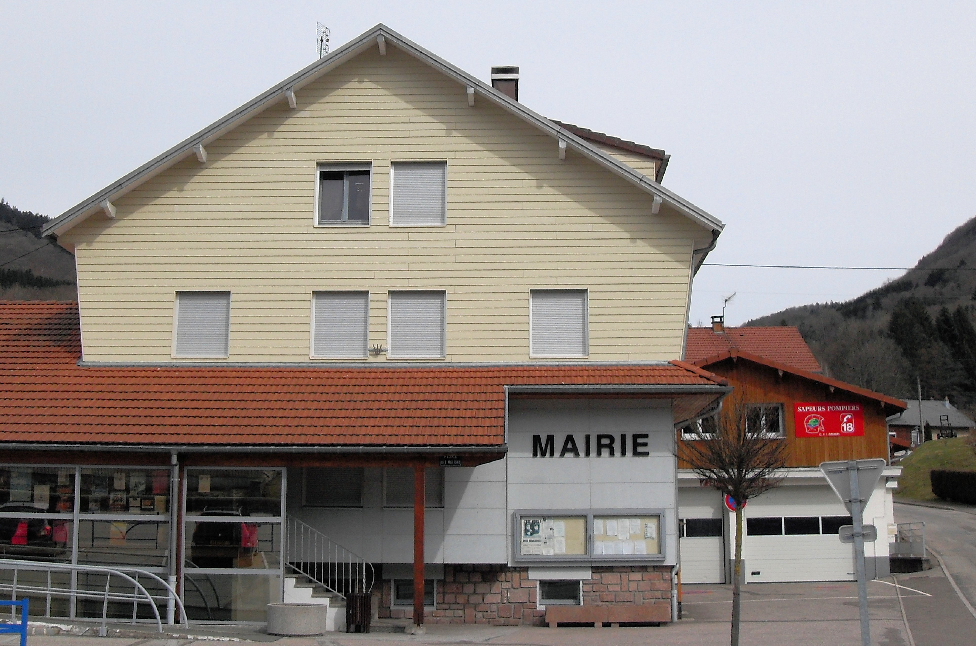 La mairie de Ferdrupt